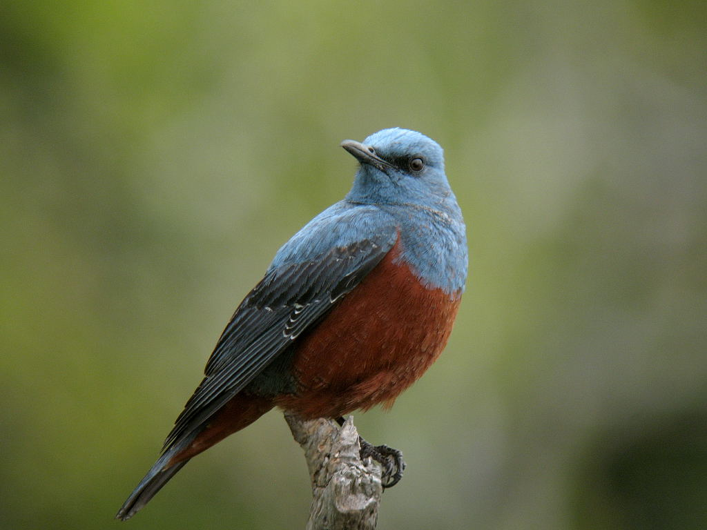 利用者の知人による撮影 （2006年5月14日、京都府丹後町経ヶ岬で撮影） （知人の承認済）